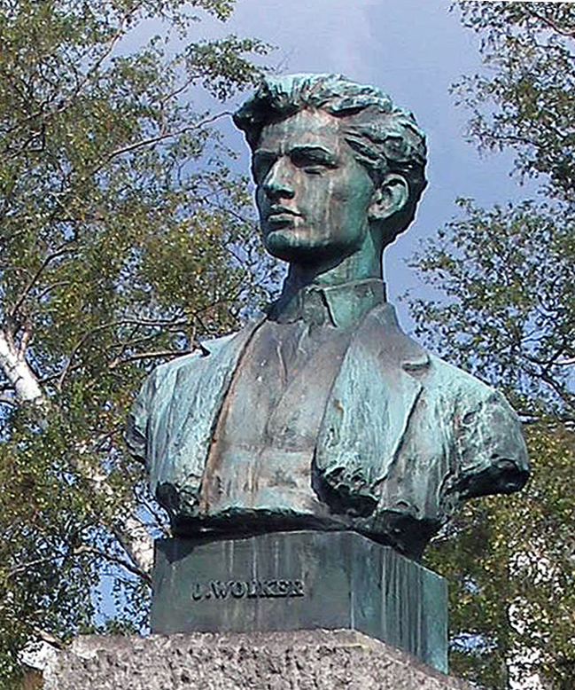 Bronzová busta Jiřího WOLKRA z Tatranskej Polianky